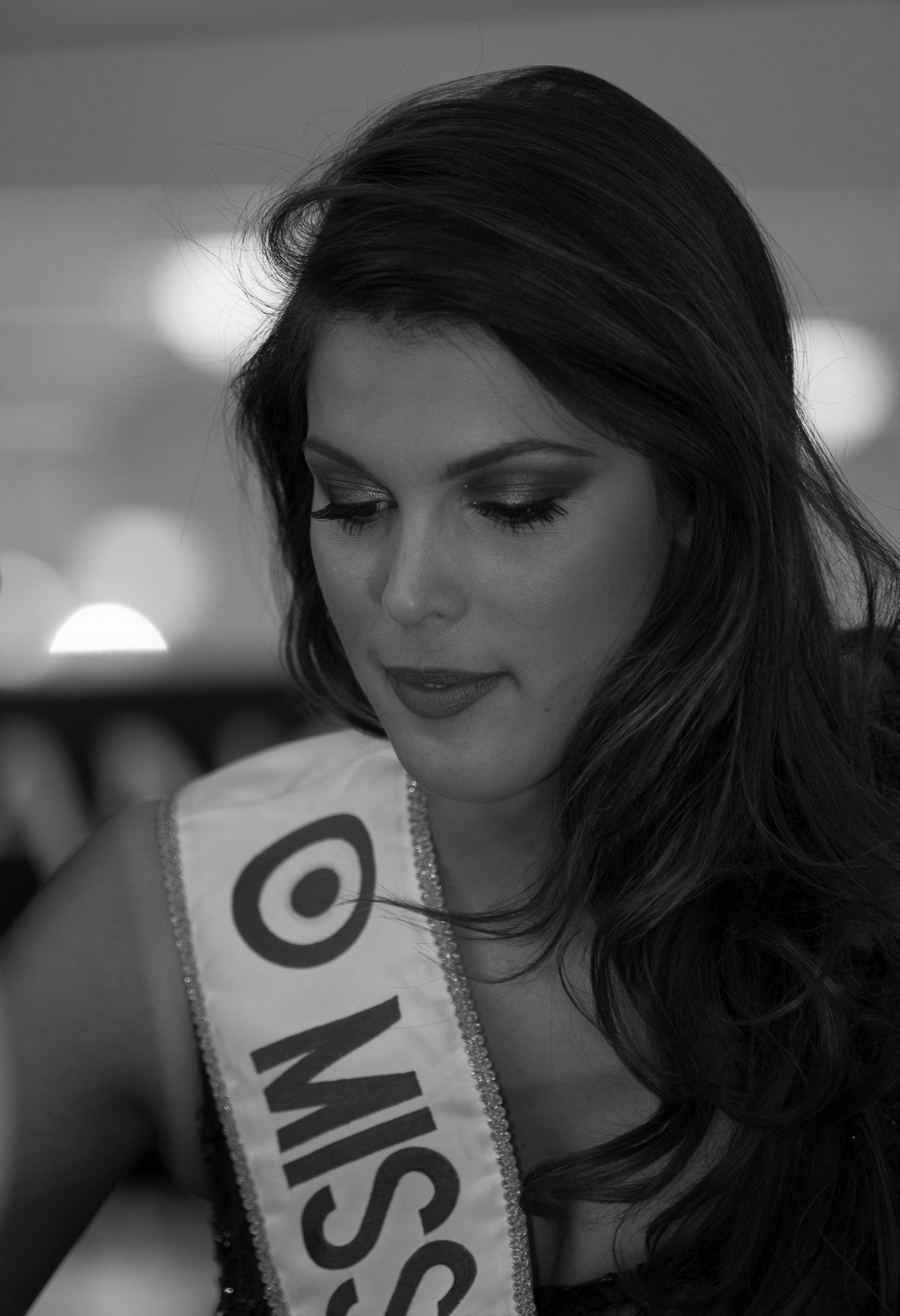 Iris Mittenaere lors de l'élection de Miss Bourgogne 2016